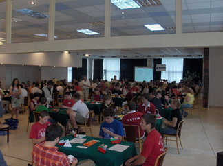 Pohľad na hraciu sálu Juniorských majstrovstiev sveta v bridži v roku 2006 v Piešťanoch.